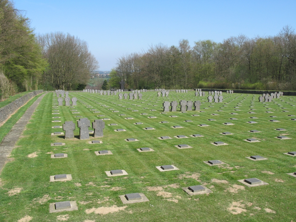 Ehrenfriedhof Vossenack (Hürtgenwald)